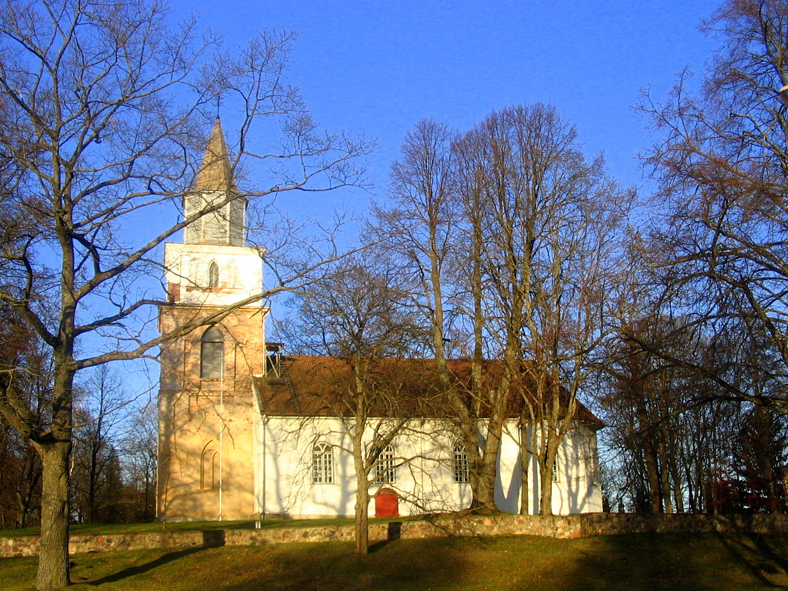 Skrunda Evangelic Lutheran Church